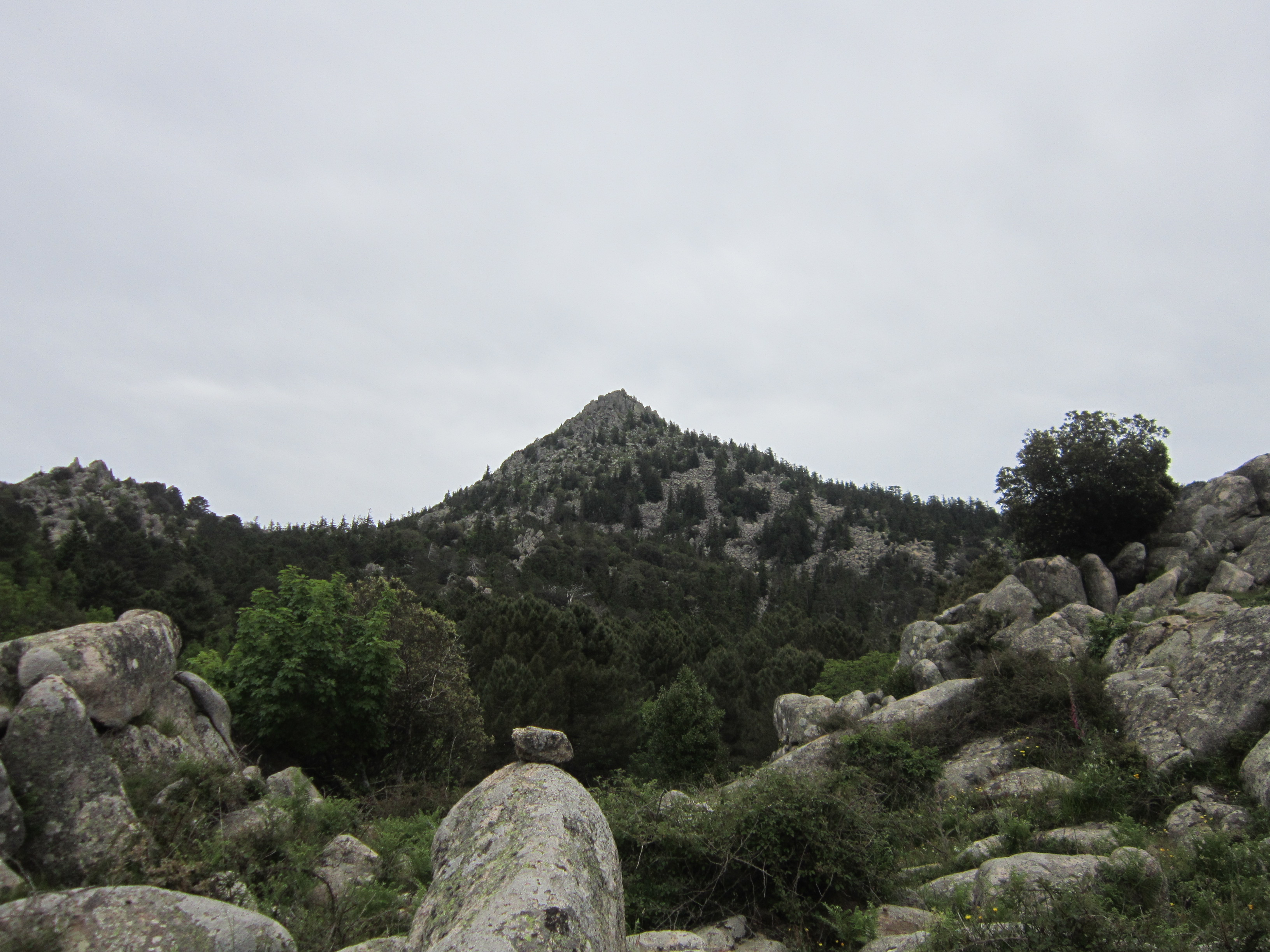 Punta d'Ovacce Corsu: Punta d'Uvacce